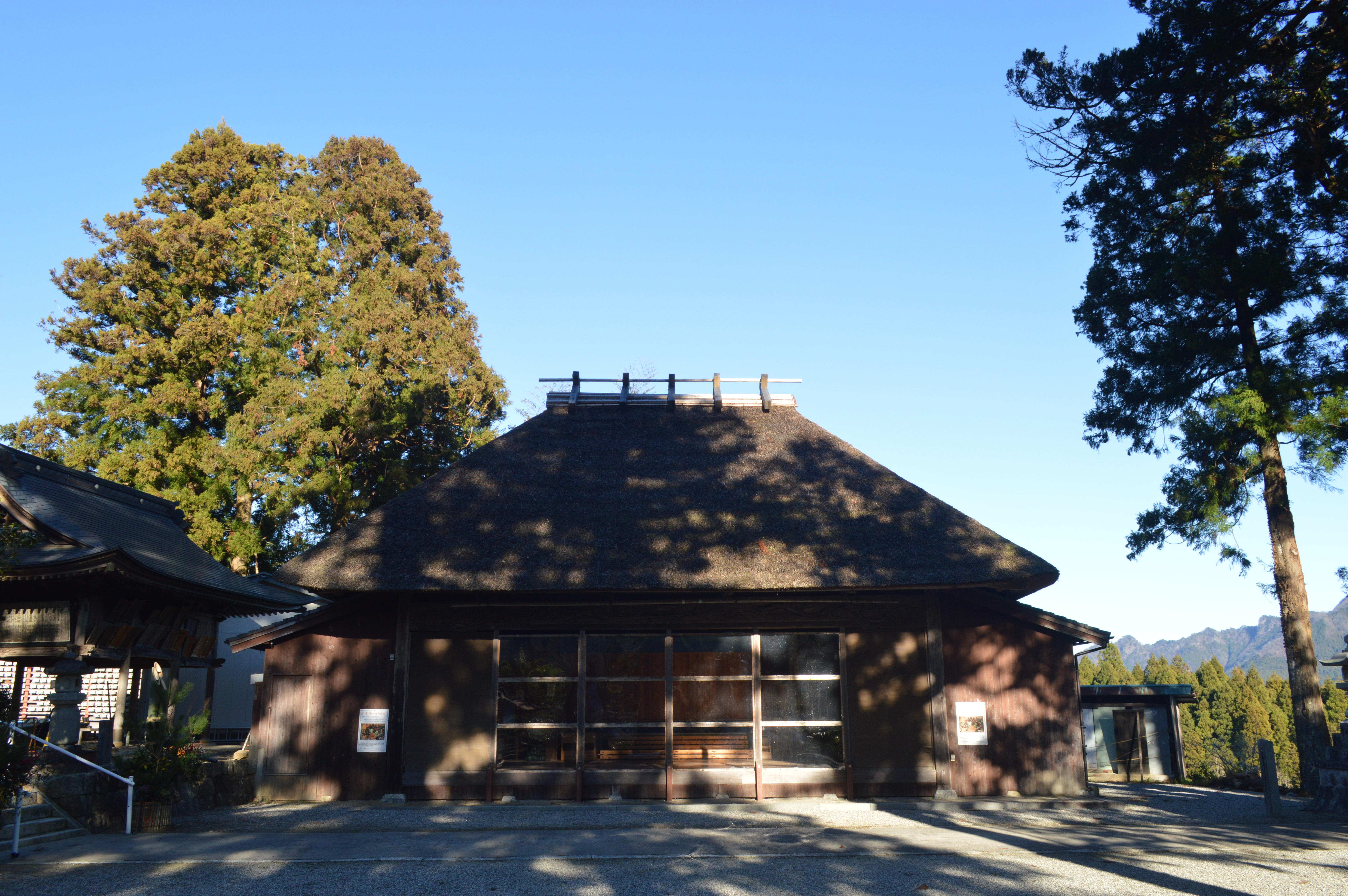 愛知県北設楽郡設楽町田峯にある田峯観音（田峰観音）。正式名は高勝寺。愛知県指定有形民俗文化財の「田峯観音の舞台」。